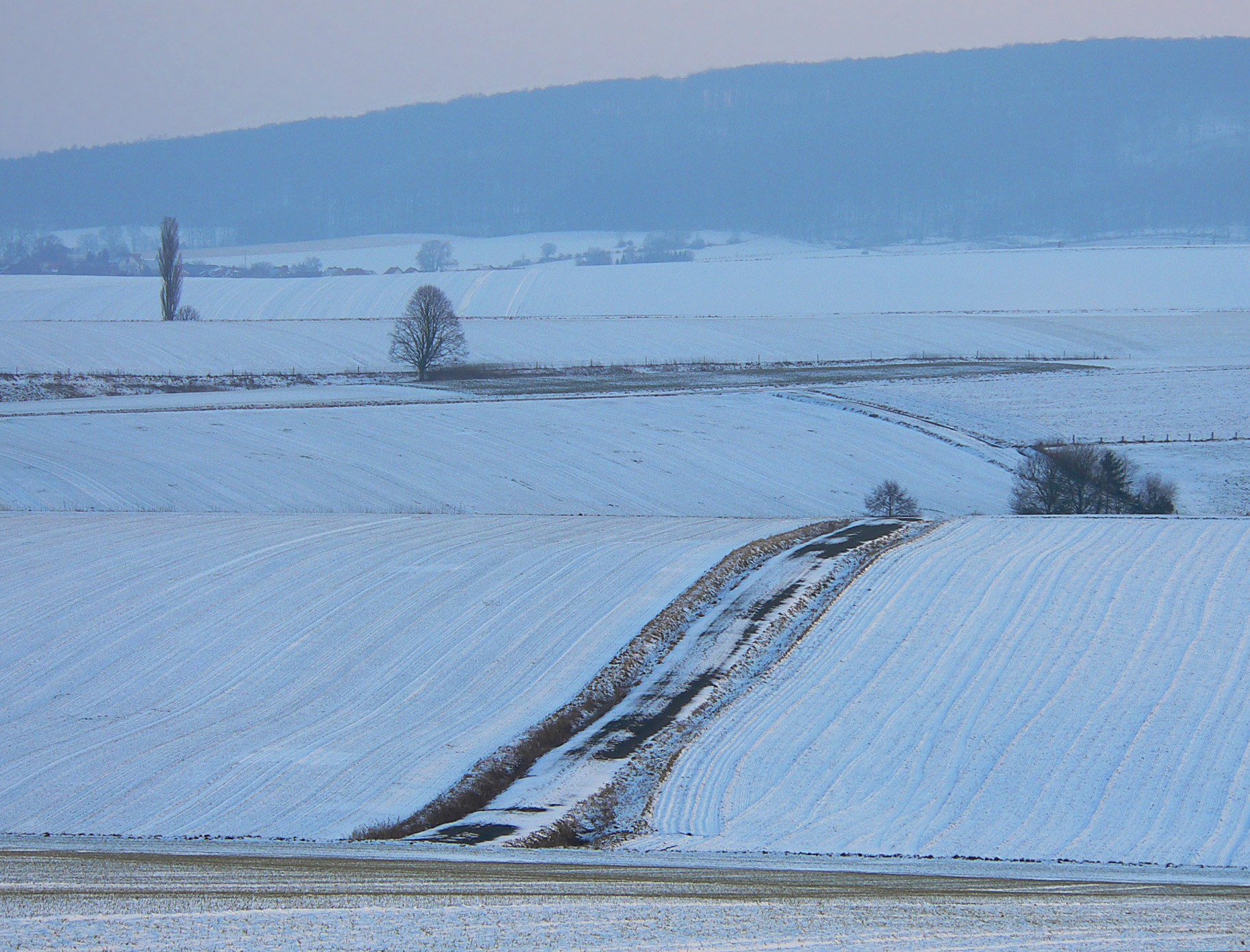 Landschaft westlich von Rhüden, von Rhüden aus gesehen